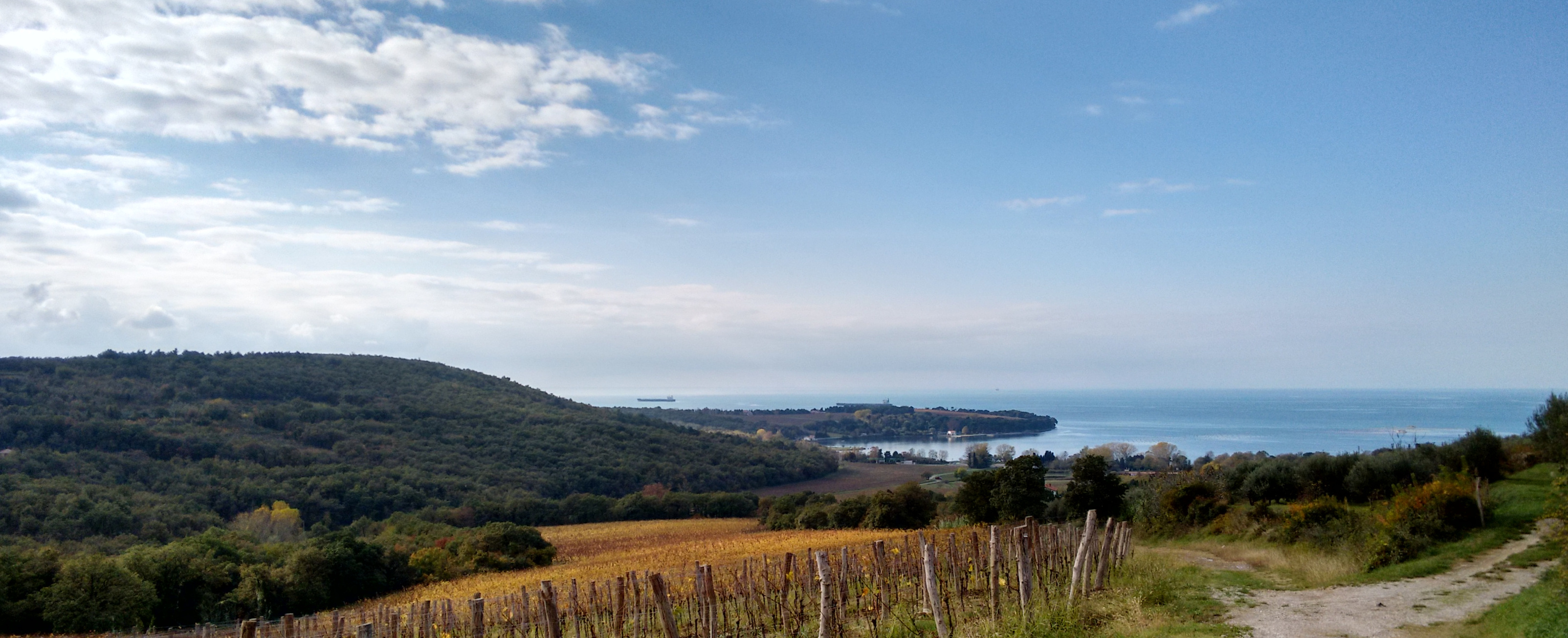 Panorama dela slovenskega morja iz Kolombrana, pogled proti Debelemu Rtiču.